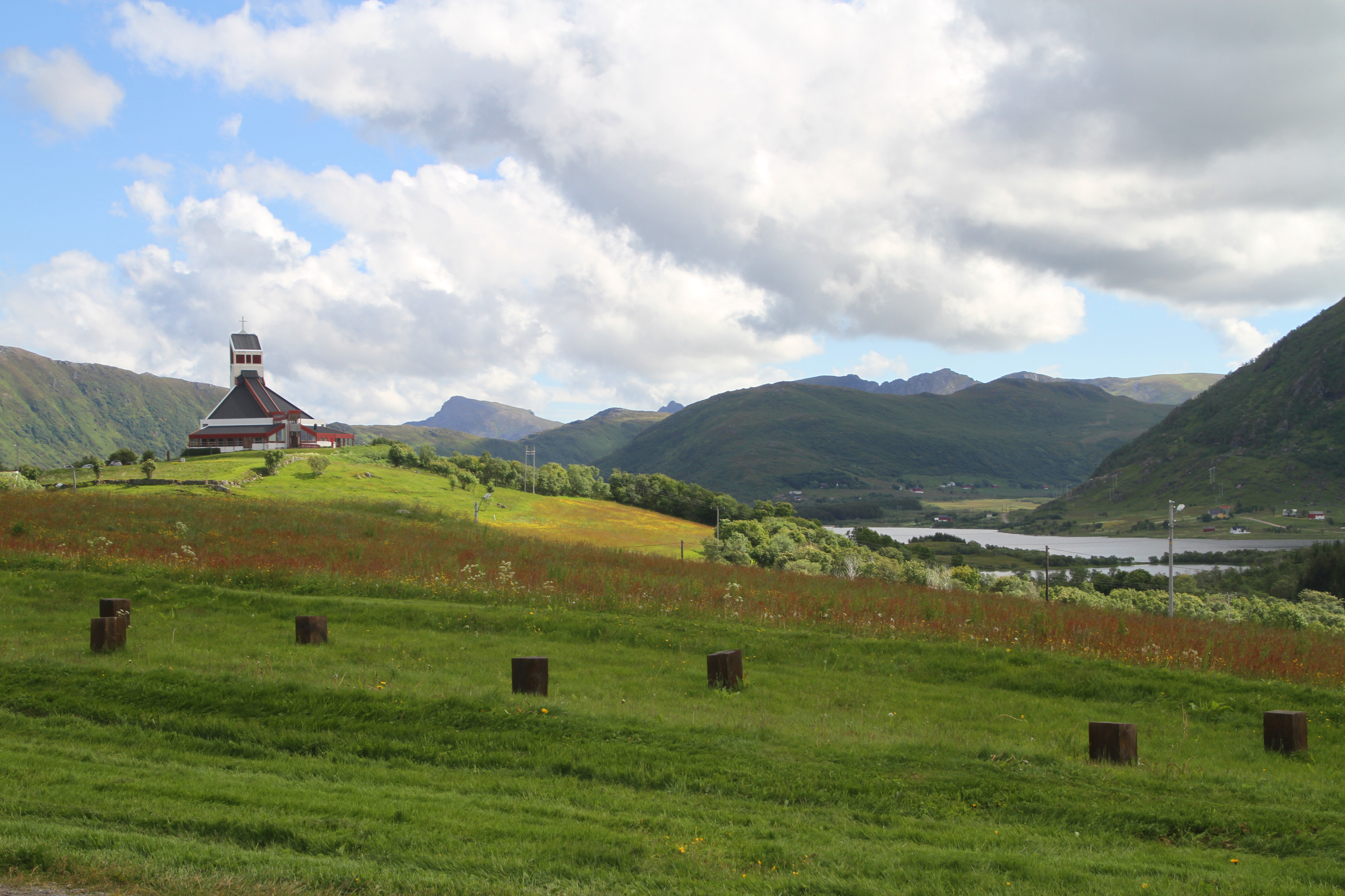 Kirche in Borg in Norwegen